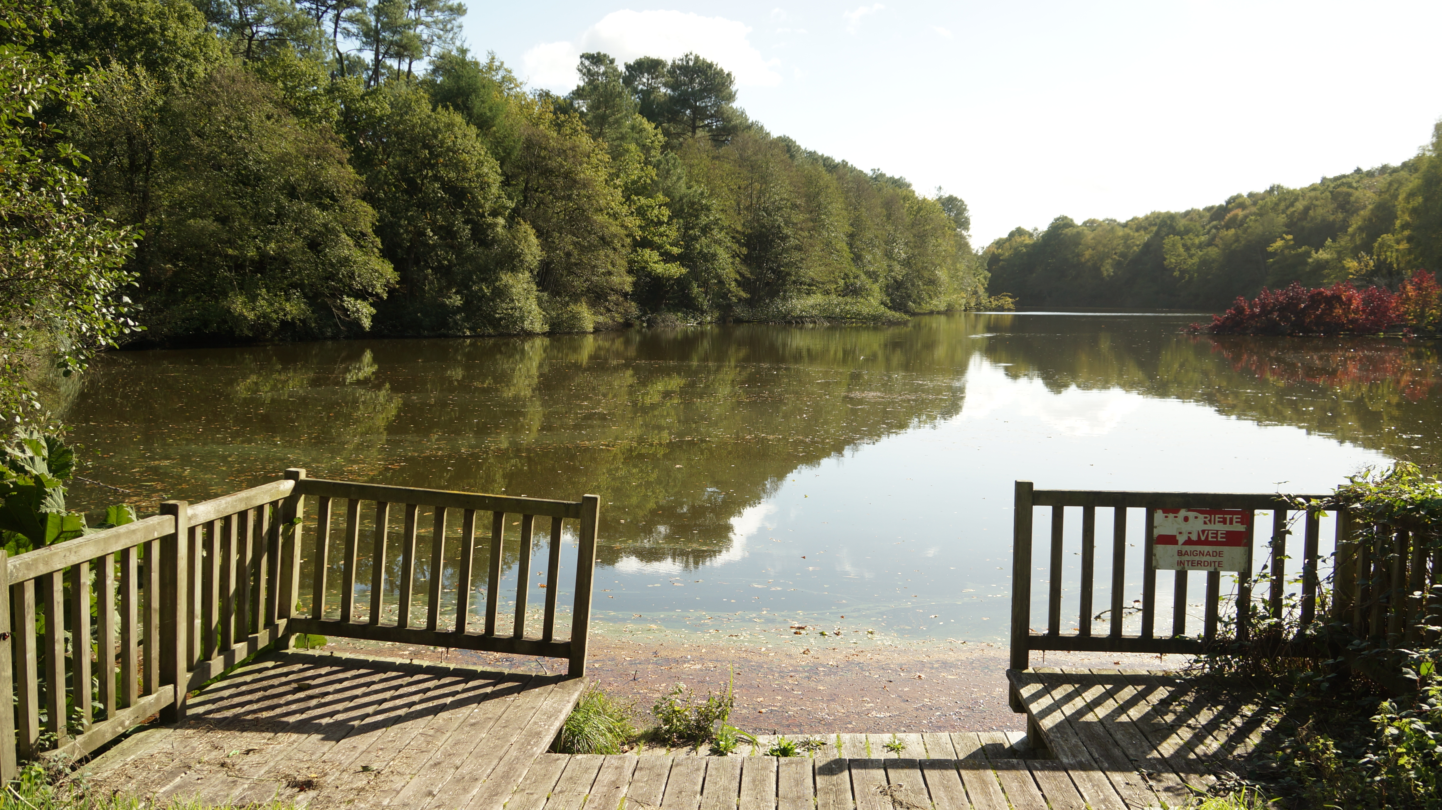 Vue de l'étang du Moulin de Quip au niveau du quai